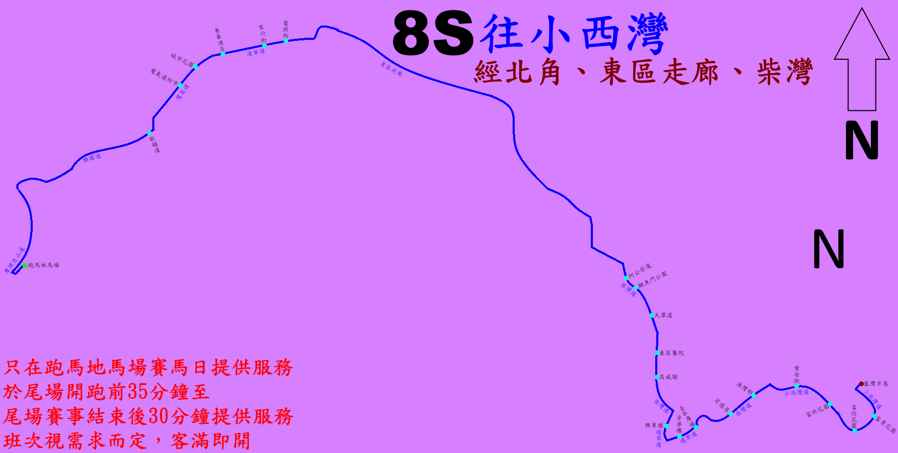 中文（香港）: 馬場巴士8S線的走線圖